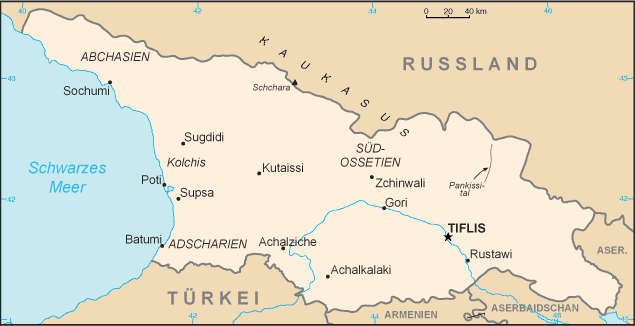 Aus dem CIA World Factbook, übersetzt; Nachbearbeitungen sind in den USA ebenfalls Public Domain.